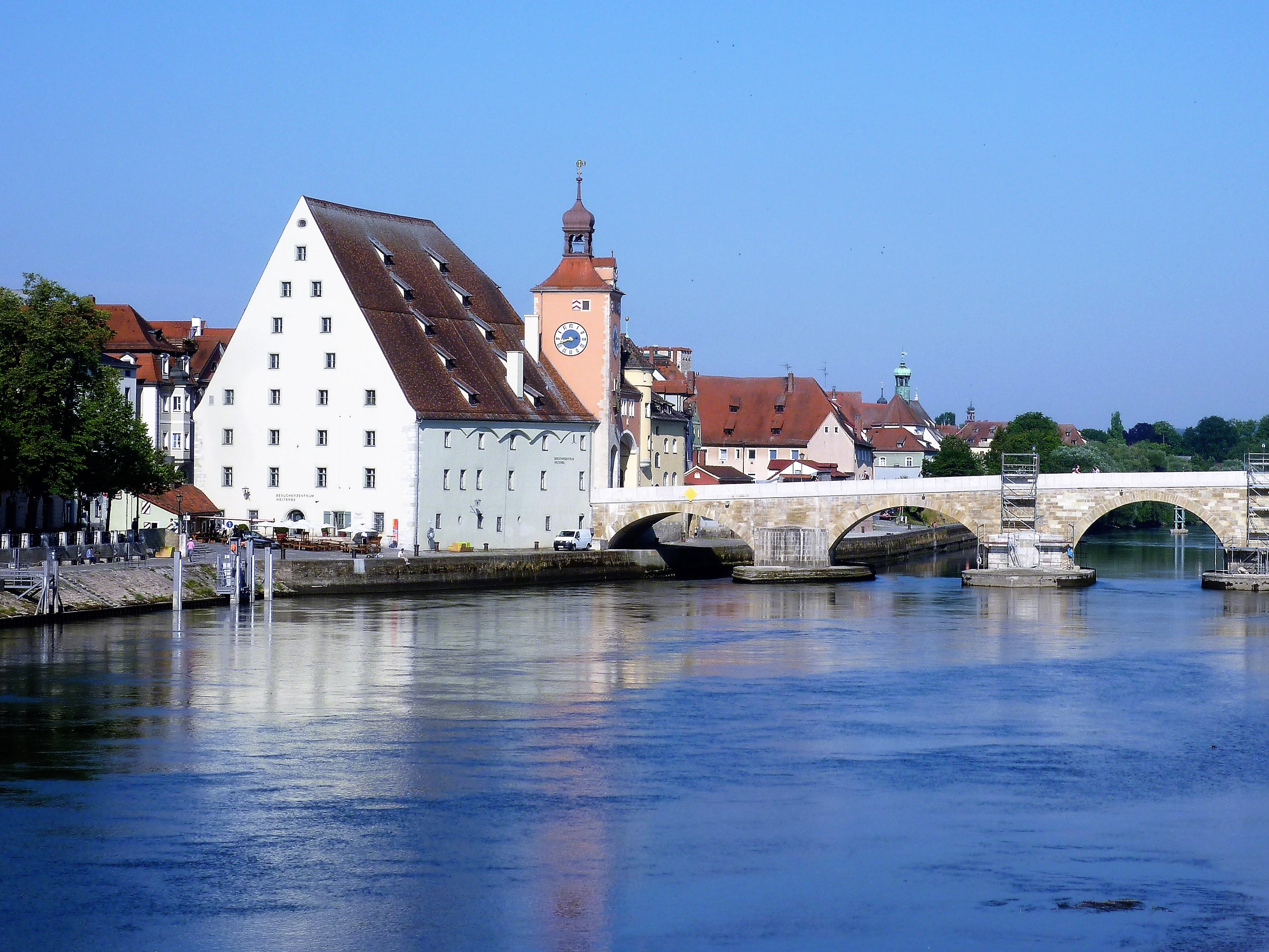 Blick über die Donau zum Historischen Salzstadel in Regensburg mit Brückenturm und Steinerner Brücke.This is a photograph of an architectural monument.